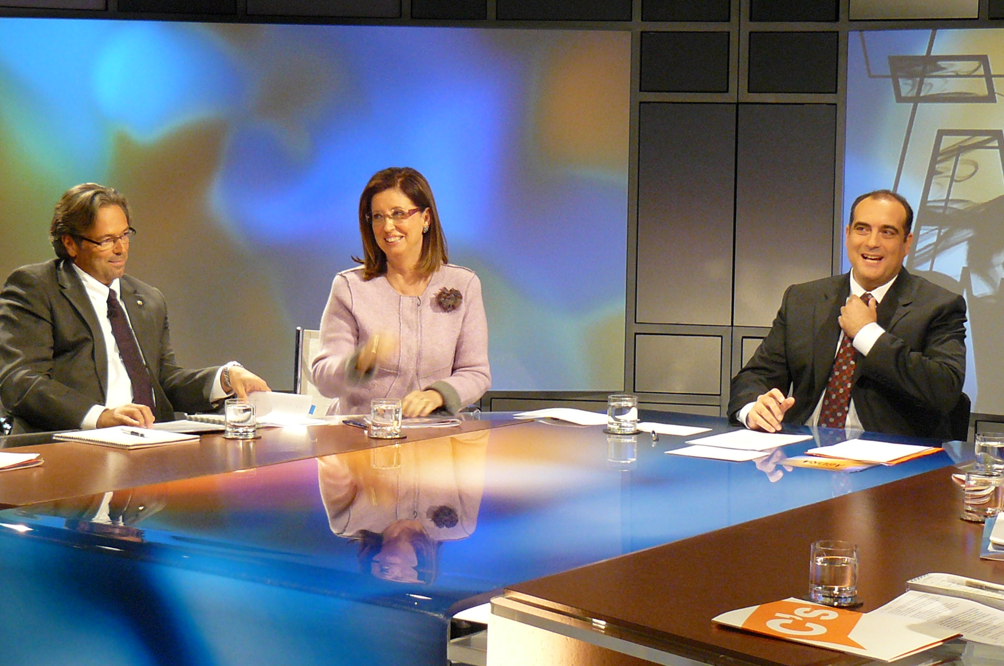 Irene Rigau debat programa Agora TV3 sobre benestar